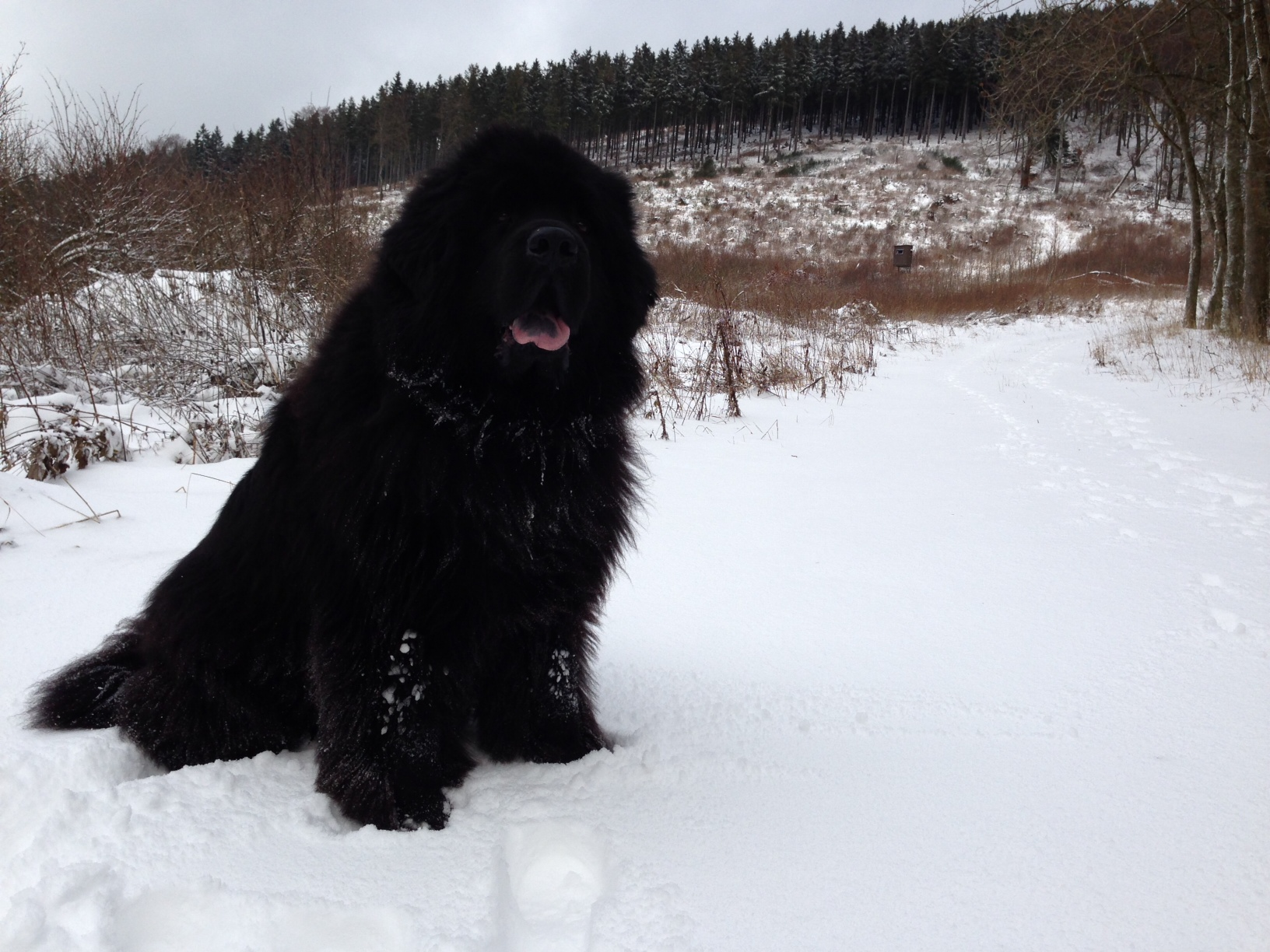 Newfoundlander